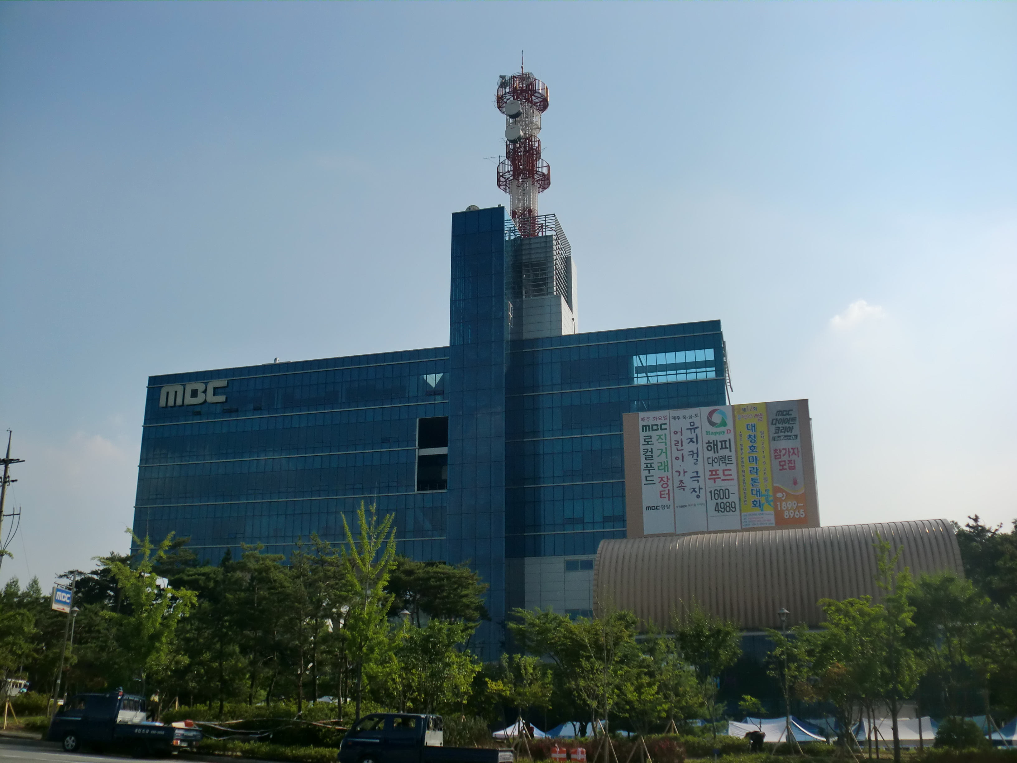 충청북도 청주시에 있는 청주문화방송